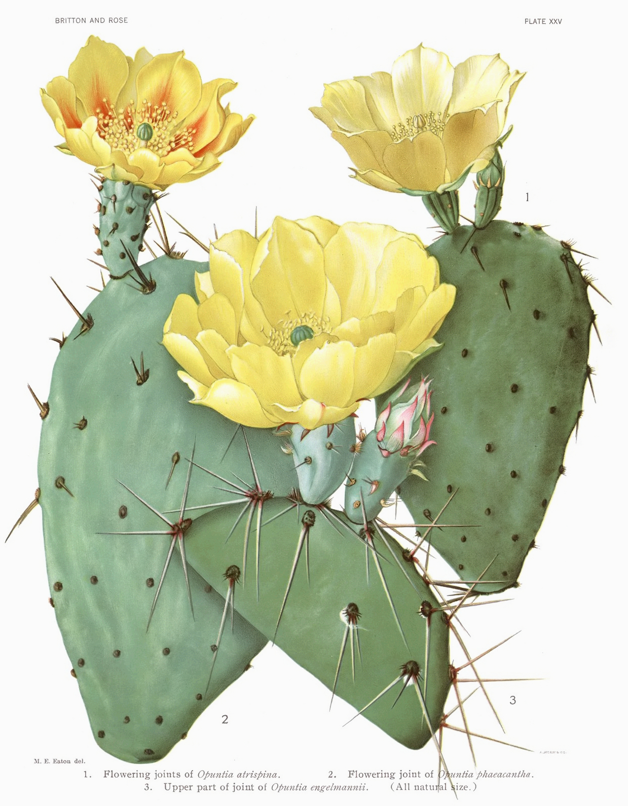 1. Opuntia atrispina, 2. Opuntia phaeacantha, 3. Opuntia engelmannii.